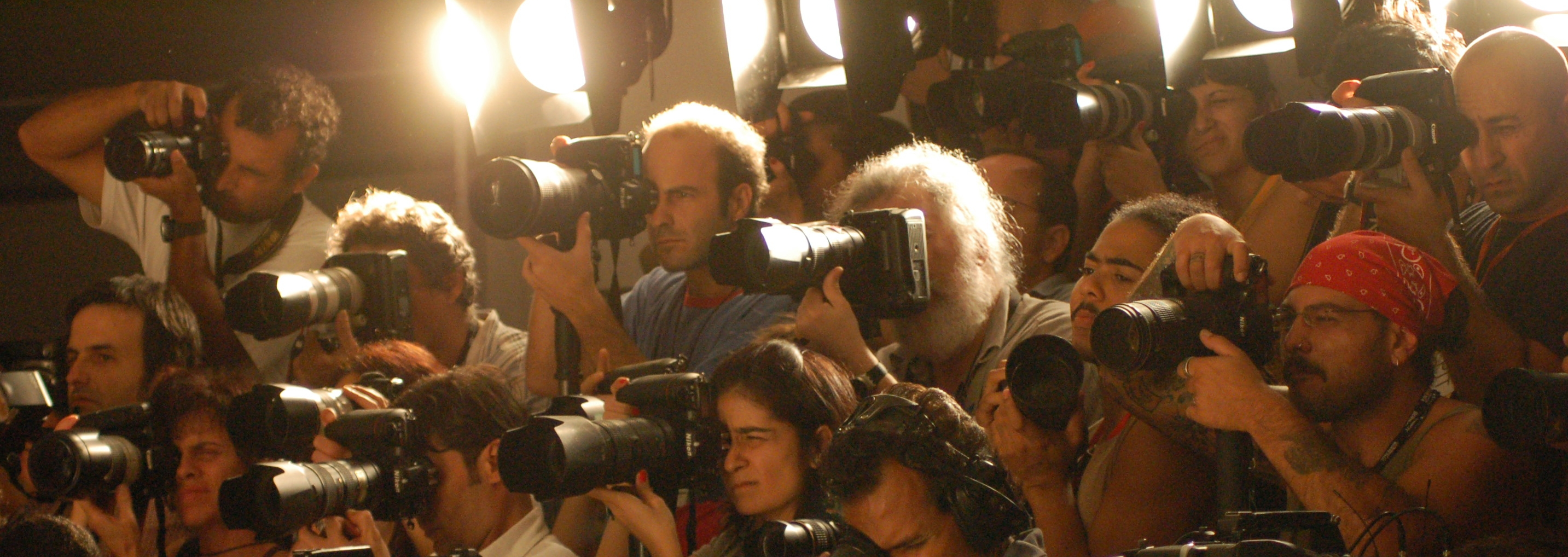 Fotógrafos no São Paulo Fashion Week edição 2007